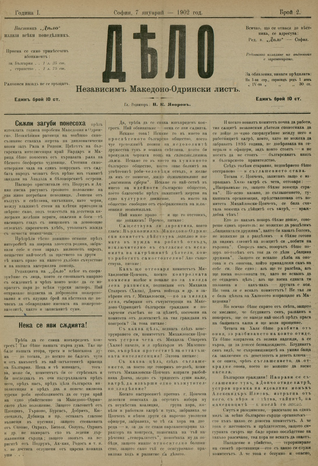 Вестникът на ВМОРО Дело, 7 януари 1902.